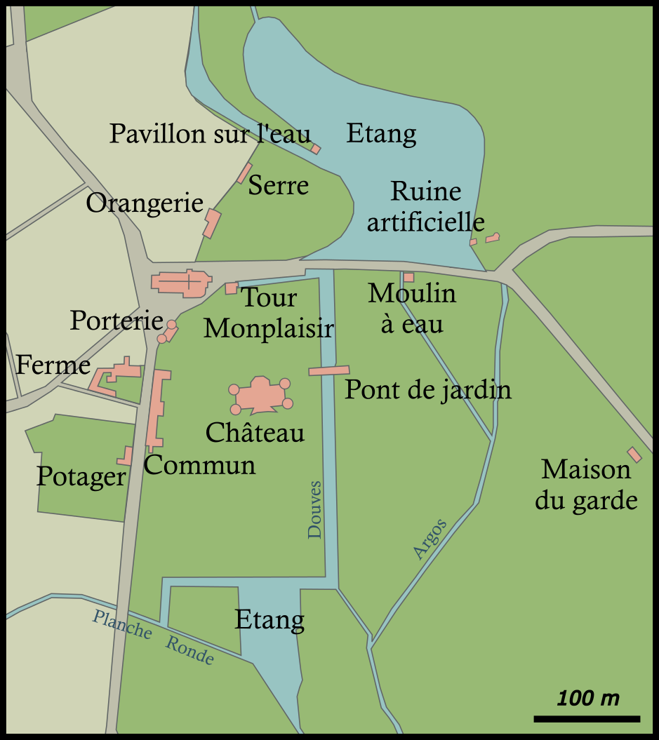 Plan du Château de Challain et son domaine, d'après le plan cadastral IGN du portail InfoTerre, commune de Challain-la-Potherie, section OE.